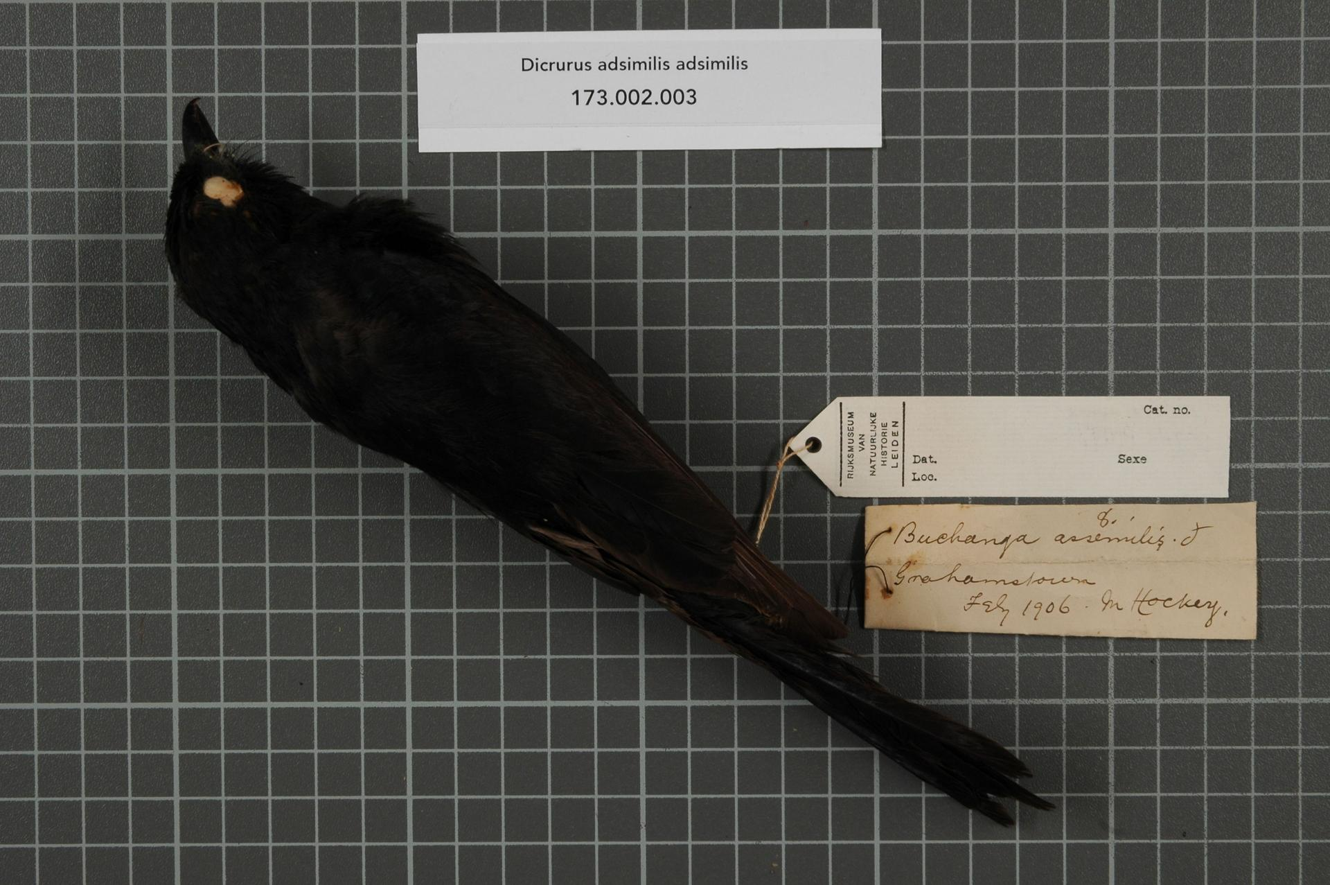 Dicrurus adsimilis adsimilis (Bechstein, 1794)